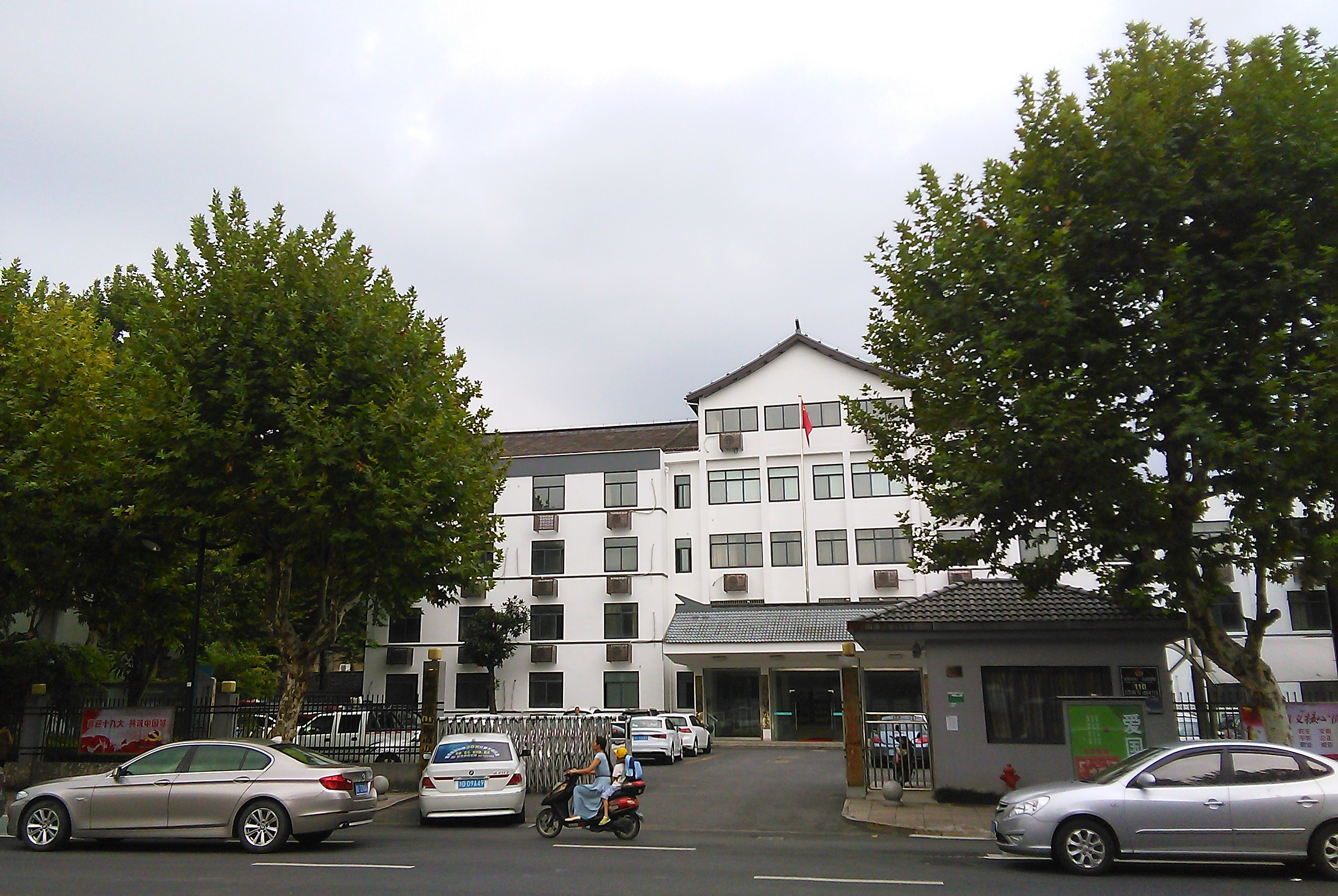 中文（中国大陆）: 塔山街道办事处